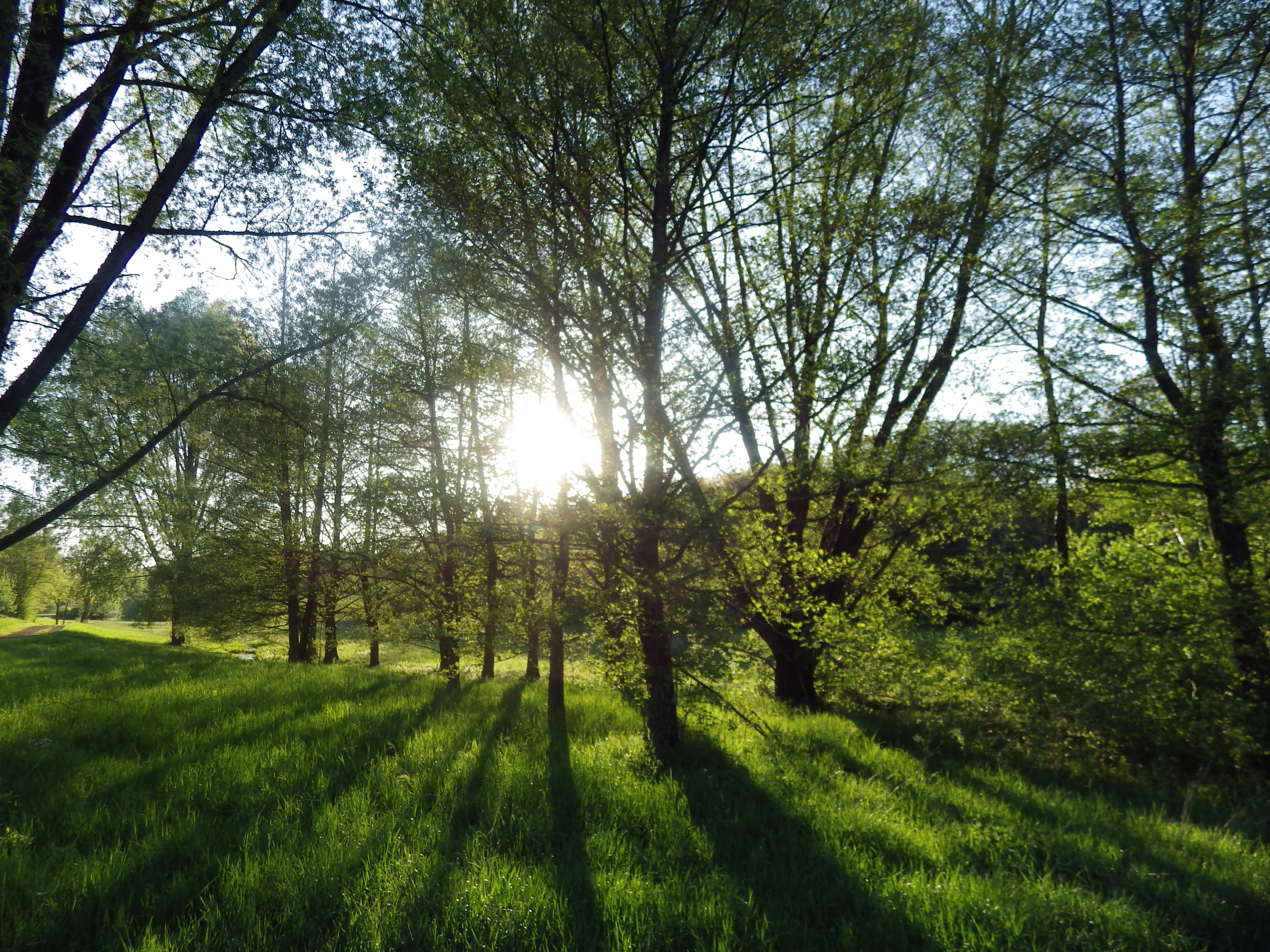 Ansicht des Naturschutzgebiets „Steinbachaue bei Dörsdorf“, Lebach, Landkreis Saarlouis, Saarland